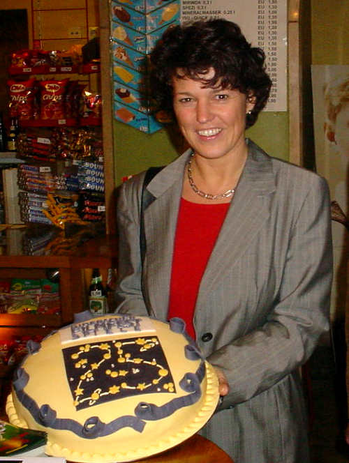 Ute Vogt in Biberach an der Riß beim 25. Filmfest Biberach Eigenes Foto von Dierk Andresen The weaver GNU-FDL Zur Verfügung gestellt von Weberberg.de, der Website für Biberach.